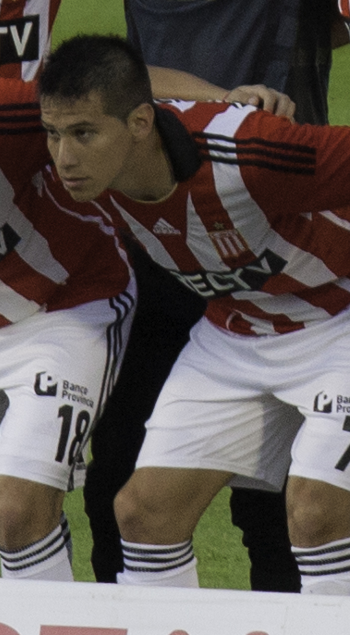 Estudiantes de La Plata starting XI against Penarol in Copa Sudamericana 2014.